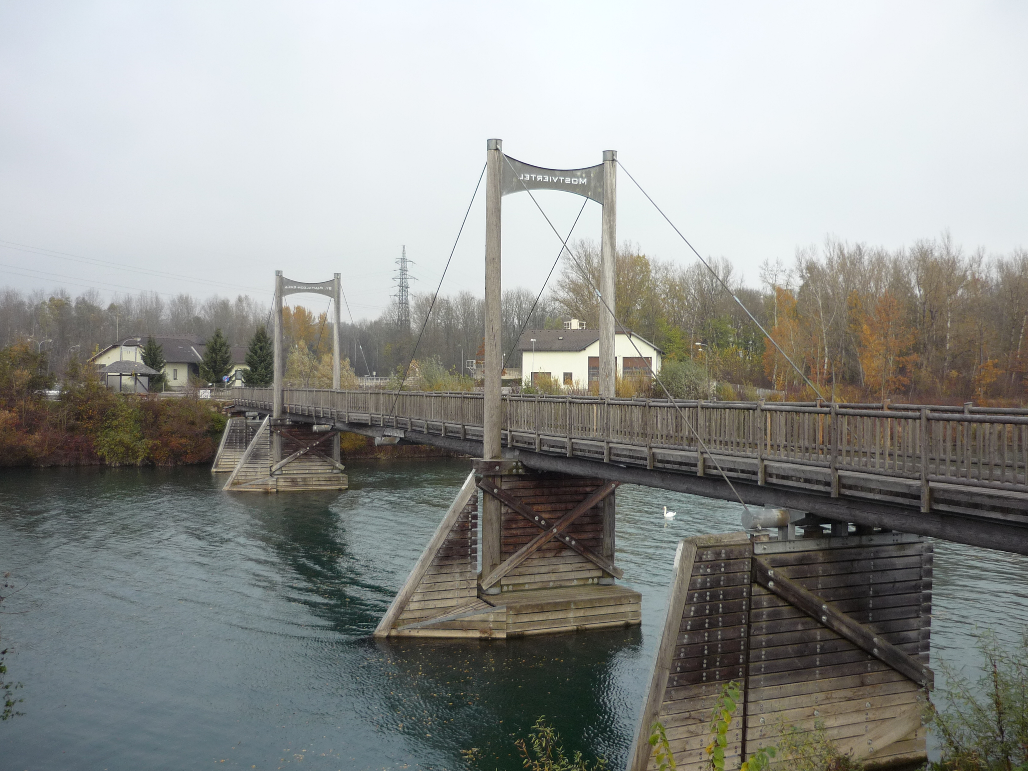 Längste Rundholzbrücke Mitteleuropas